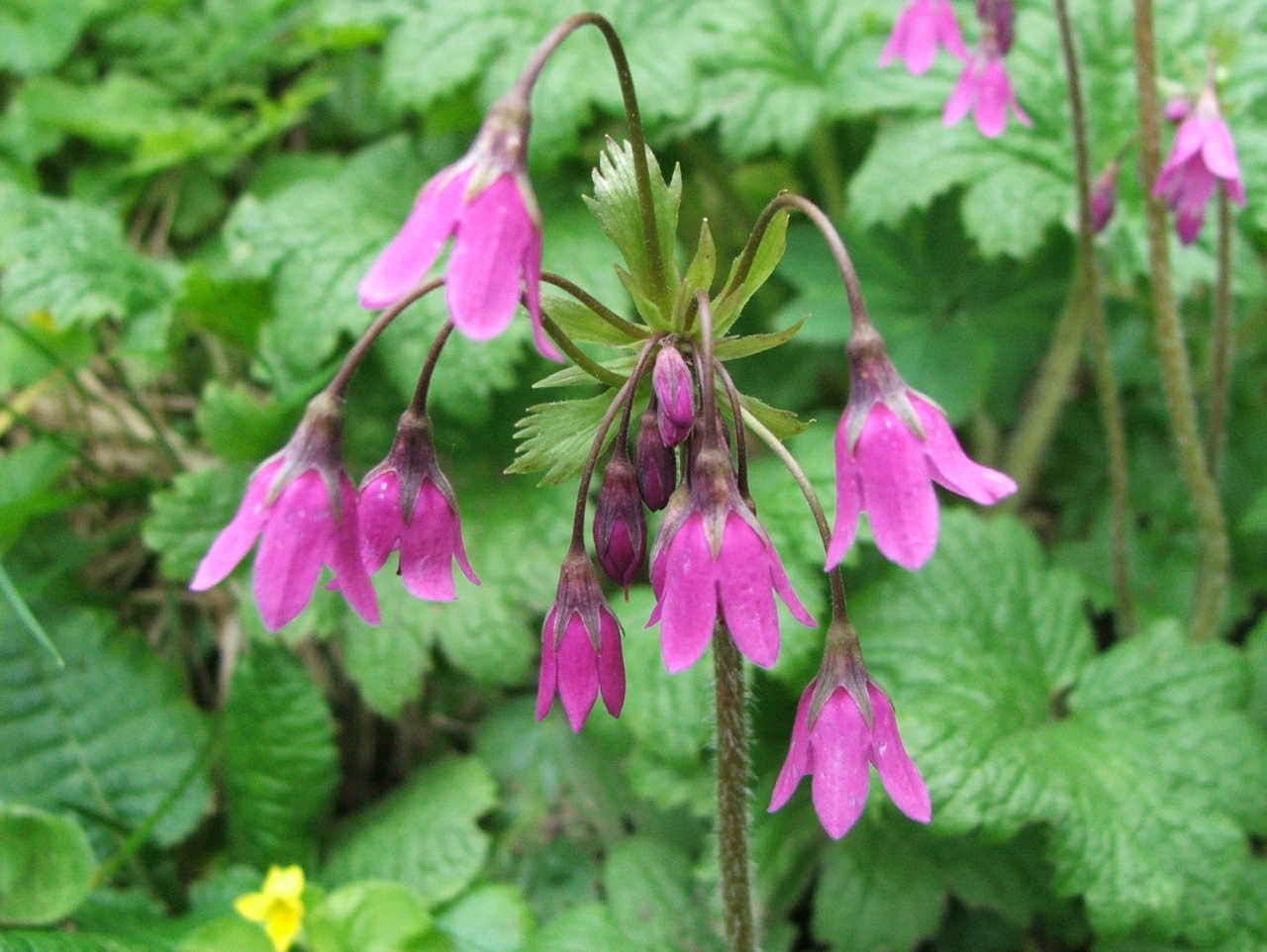 Cortusa matthioli (pl. zarzyczka górska), habitat: Tatry Mountains, Dolina Waksmundzka